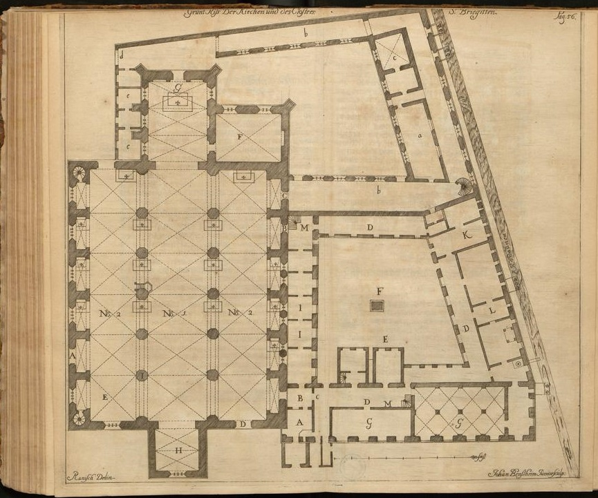 Grundriss Brigittenkirche in Danzig, Legende zum Grundriss: Kirche: A: Großer Eingang, B und C: Türen von der Kirche zum Kreuzgang des Nonnenklosters, D: Tür zum Nonnen-Hof, E: Gewölbe im Bereich des Turms, F: Ankleidekammer, G: großer Altar, H: Gewölbe über der heiligen Grabhalle. Kloster: A: Eingang zum Kloster, B: Gesprächsstube mit Fremden, C: Eingang für das Gesinde zum Kloster, D: Umgänge im Kloster, E: innerer Klosterhof, F: ein Brunnen, G: Essenstube, H: Küche, I: Speisekammer, K: Backhaus, L: Waschhaus und Badestube, M: Aufgang zum Schlafhaus und Zellen.